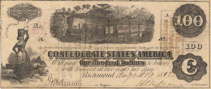 КША. 1862 100 долларов. Аверс. Односторонние (на обр. стороне - прямоугольные штампы)